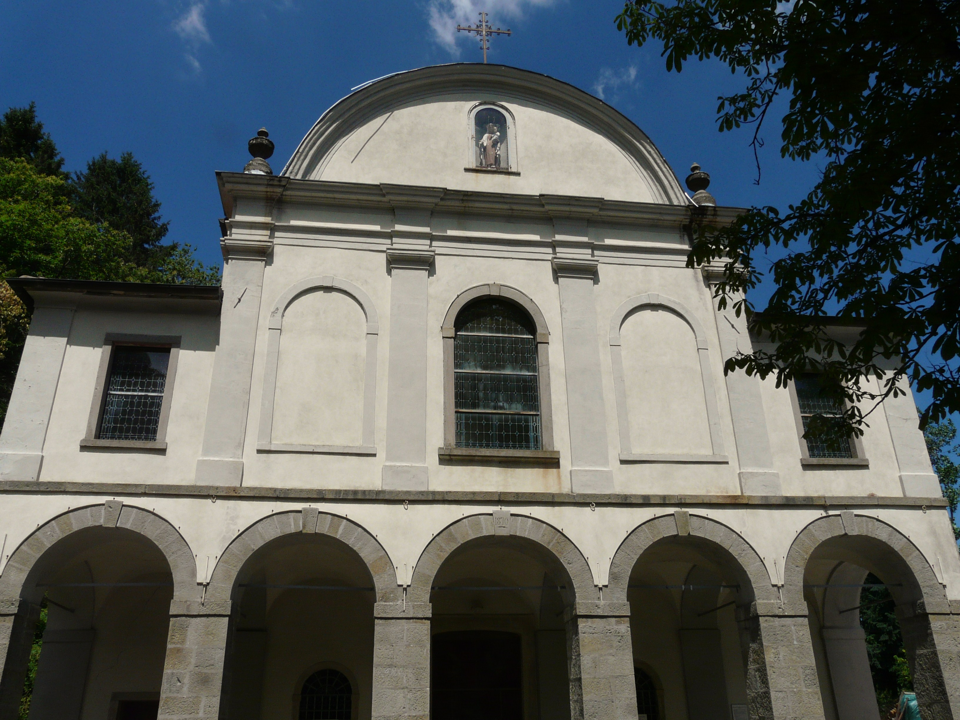 Santuario della Madonna del Carmelo, Tarsogno, Tornolo, Emilia Romagna, Italia